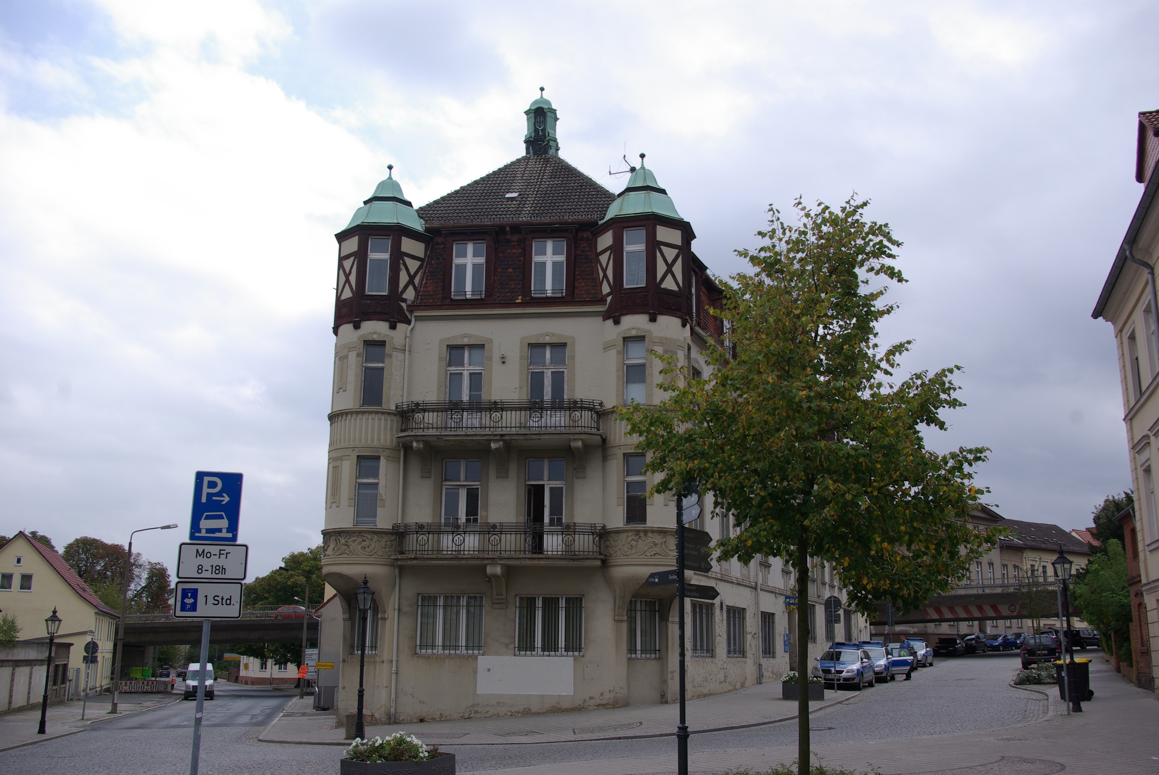 Bad Freienwalde in Brandenburg. Das Haus in der Gesundbrunnenstraße 1 steht unter Denkmalschutz. Links vom Haus befindet sich die Königsstraße. Über die Brücken rechts und links führt die B158.